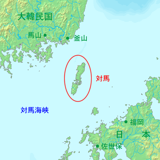 対馬の位置